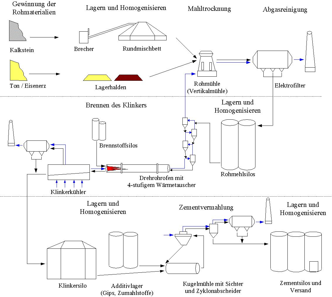 Darstellung eines Zementwerkes (Schema)